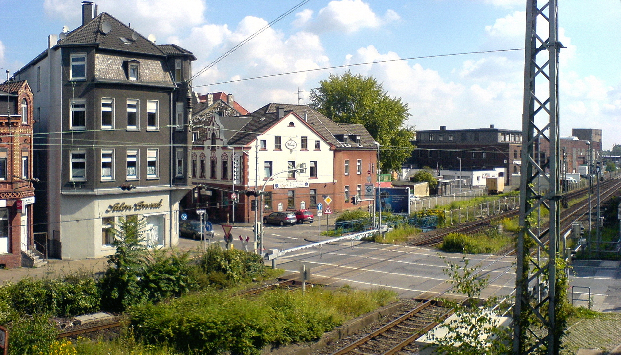 Bahnübergang und Hotel Hoppe im Zentrum von Witten-Annen.